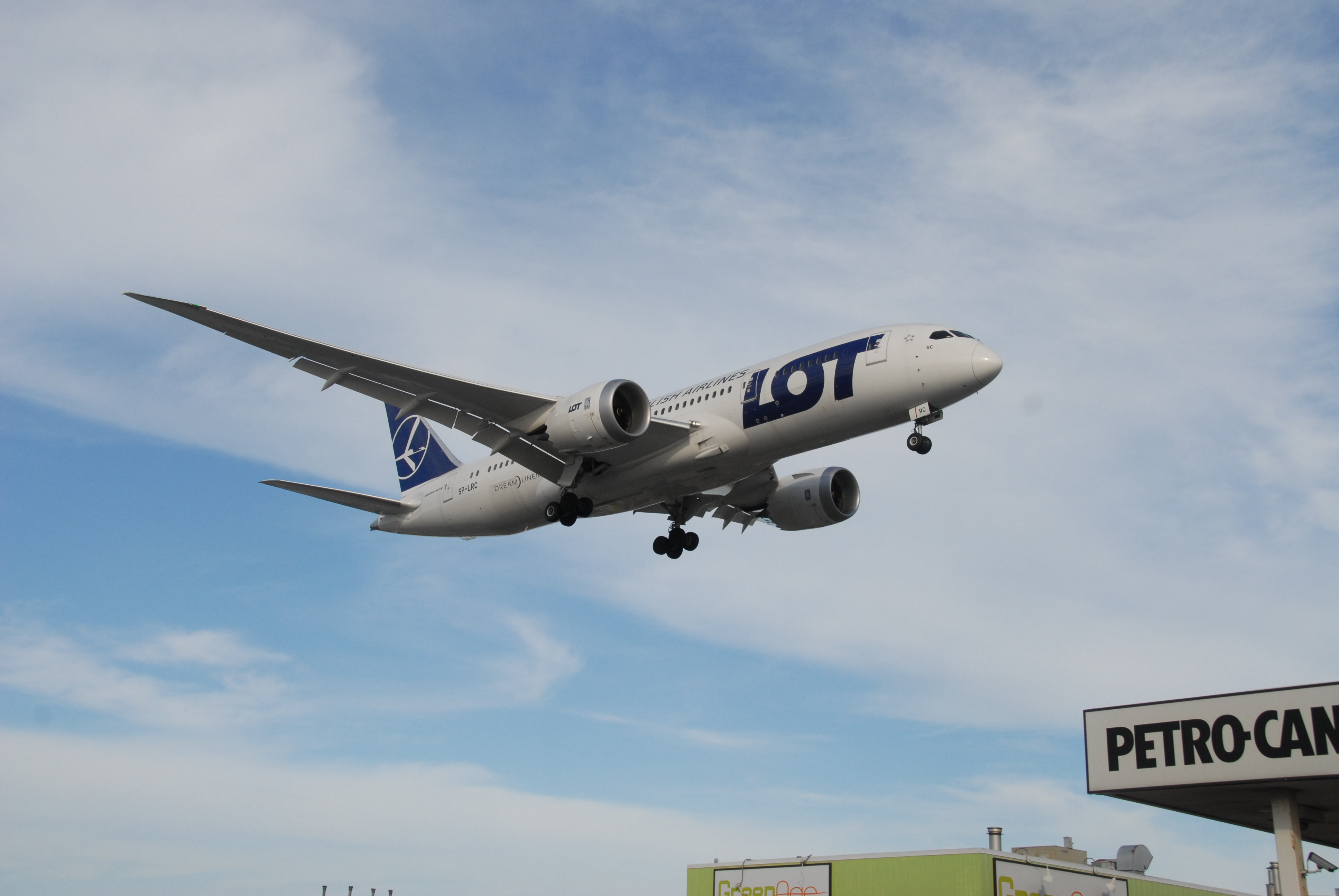 LOT - Polish Airlines - Polskie Linie Lotnicze - Boeing 787-8 Dreamliner - SP-LRC - Flight LO41 WAW - YYZ